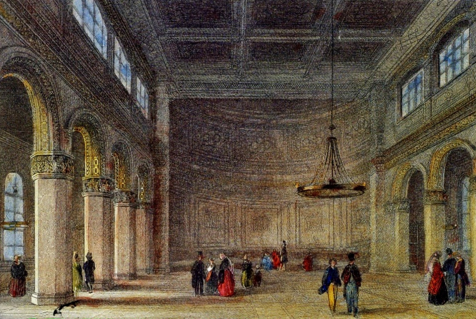 Der Bad Kissinger Conversationssaal (Rossini-Saal) in seinem ursprünglichen Aussehen um 1845